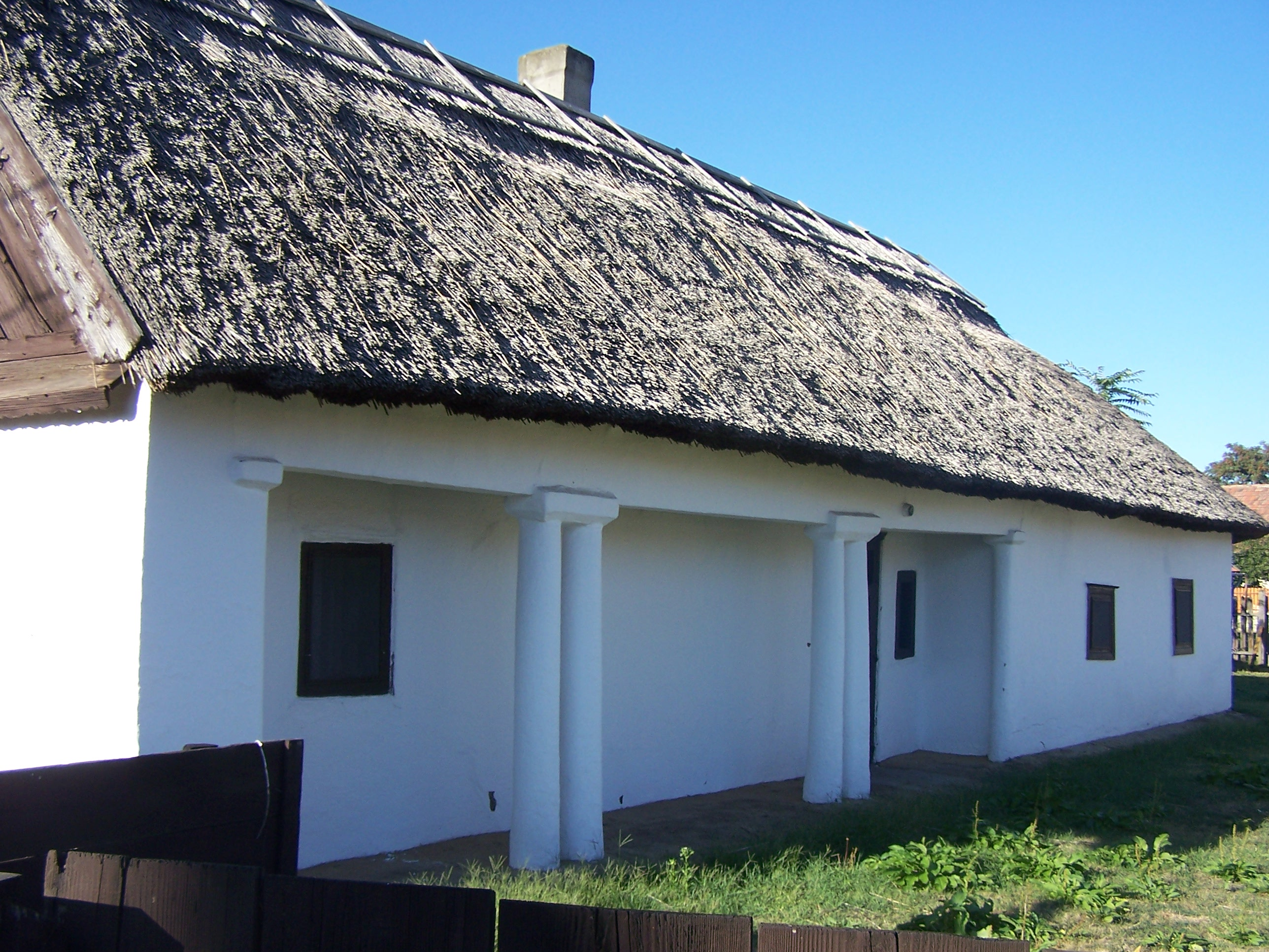 Tájház (Szentistván, Rákóczi Ferenc utca 16.) This is a photo of a monument in Hungary, Identifier: 3195